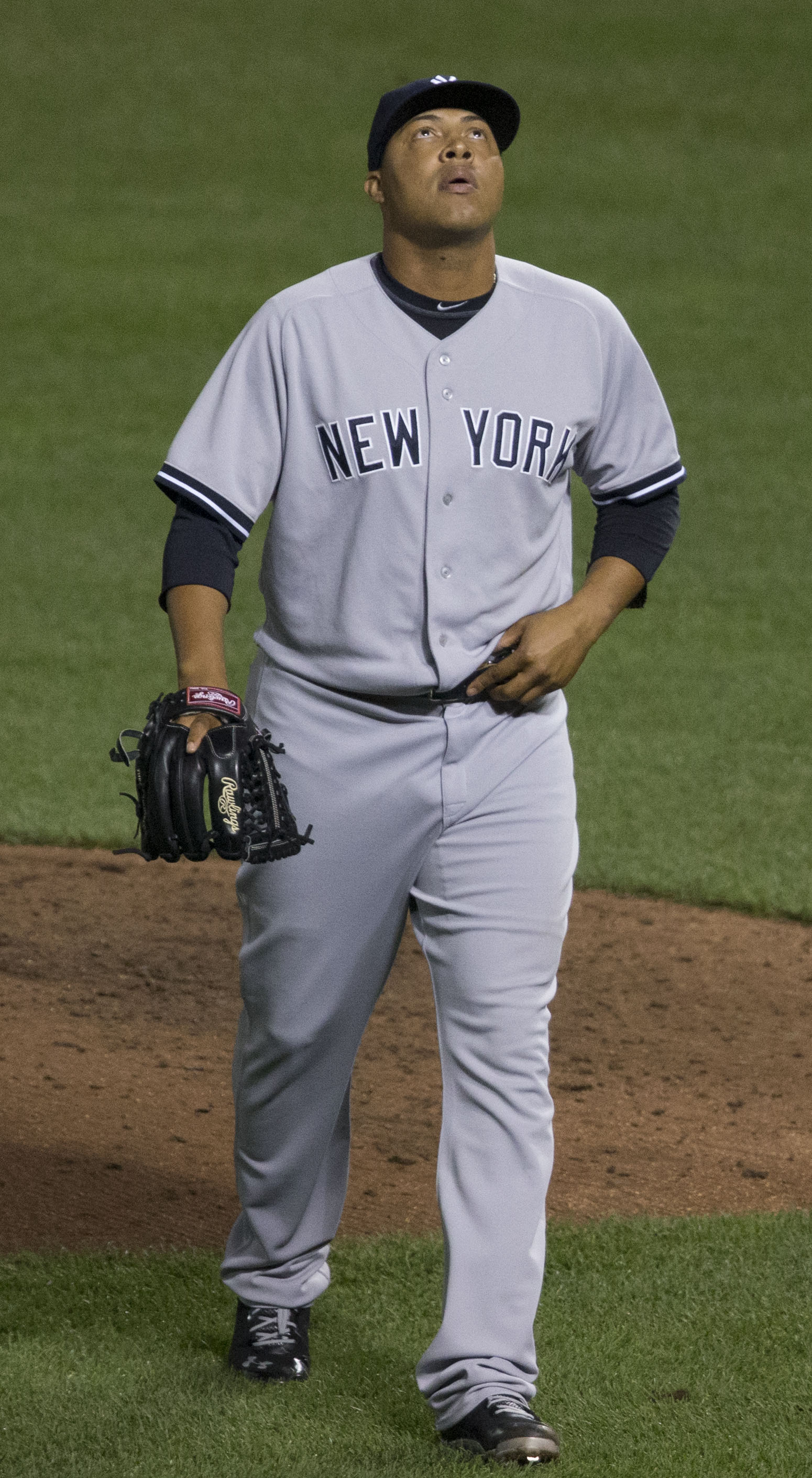 César Cabral